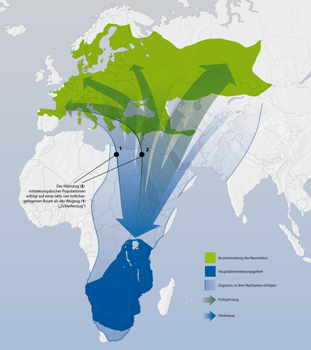 Brutverbreitung, Winterquartiere und Zugbewegungen (schematisiert). Brutverbreitung, Überwinterungsgebiete und Zugbewegungen des Neuntöters.